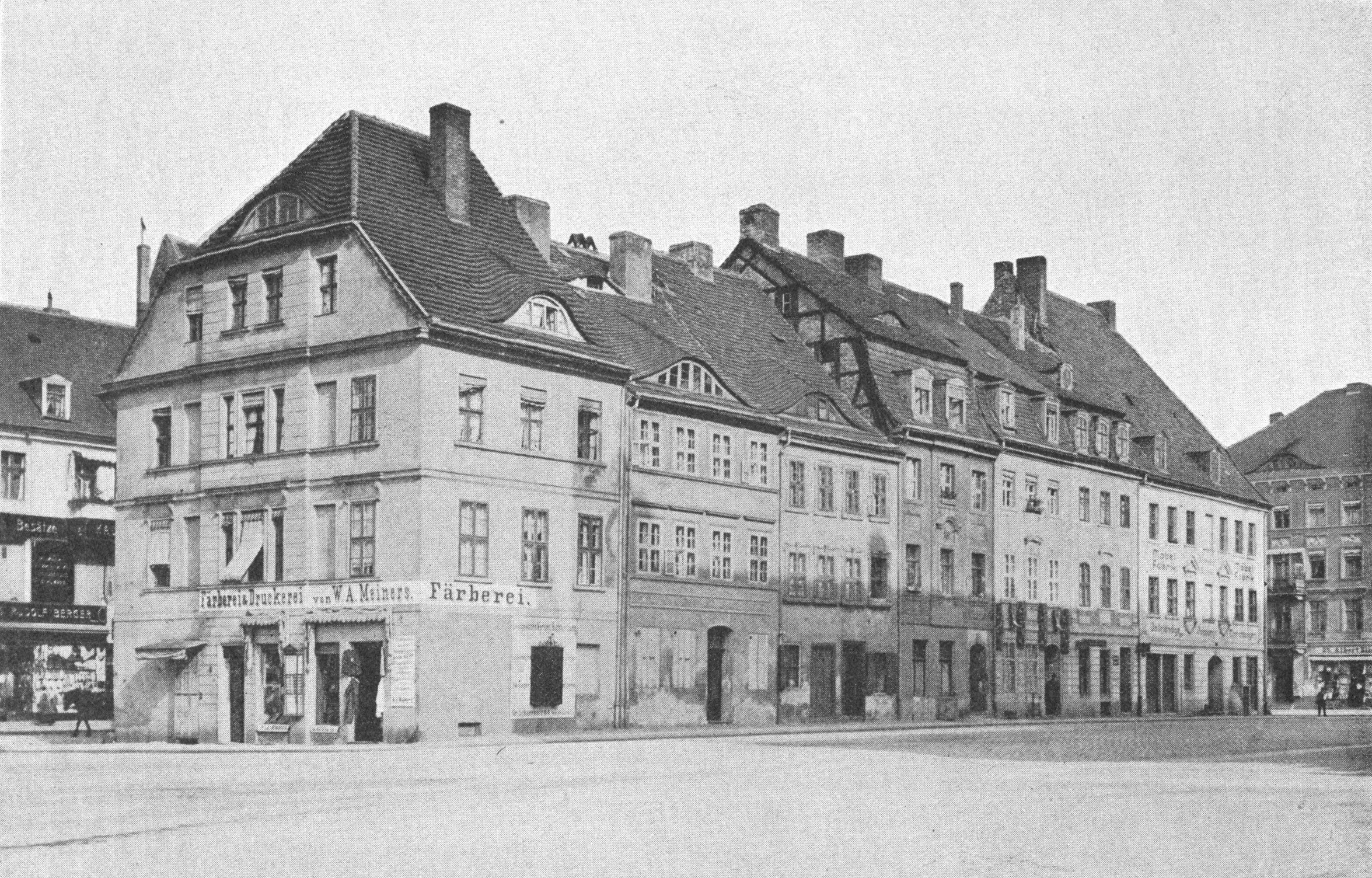 Abb. 162. Häuserblock im Marktplatz, westlich vom Rathause.